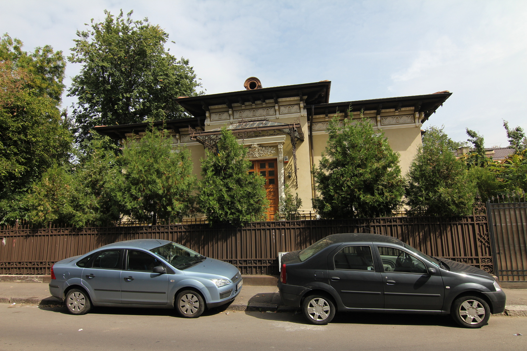 Casă pe Str Romulus